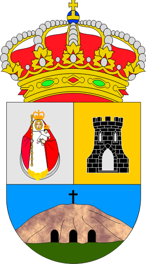 Escudo de Los Silos, en Santa Cruz de Tenerife (España)